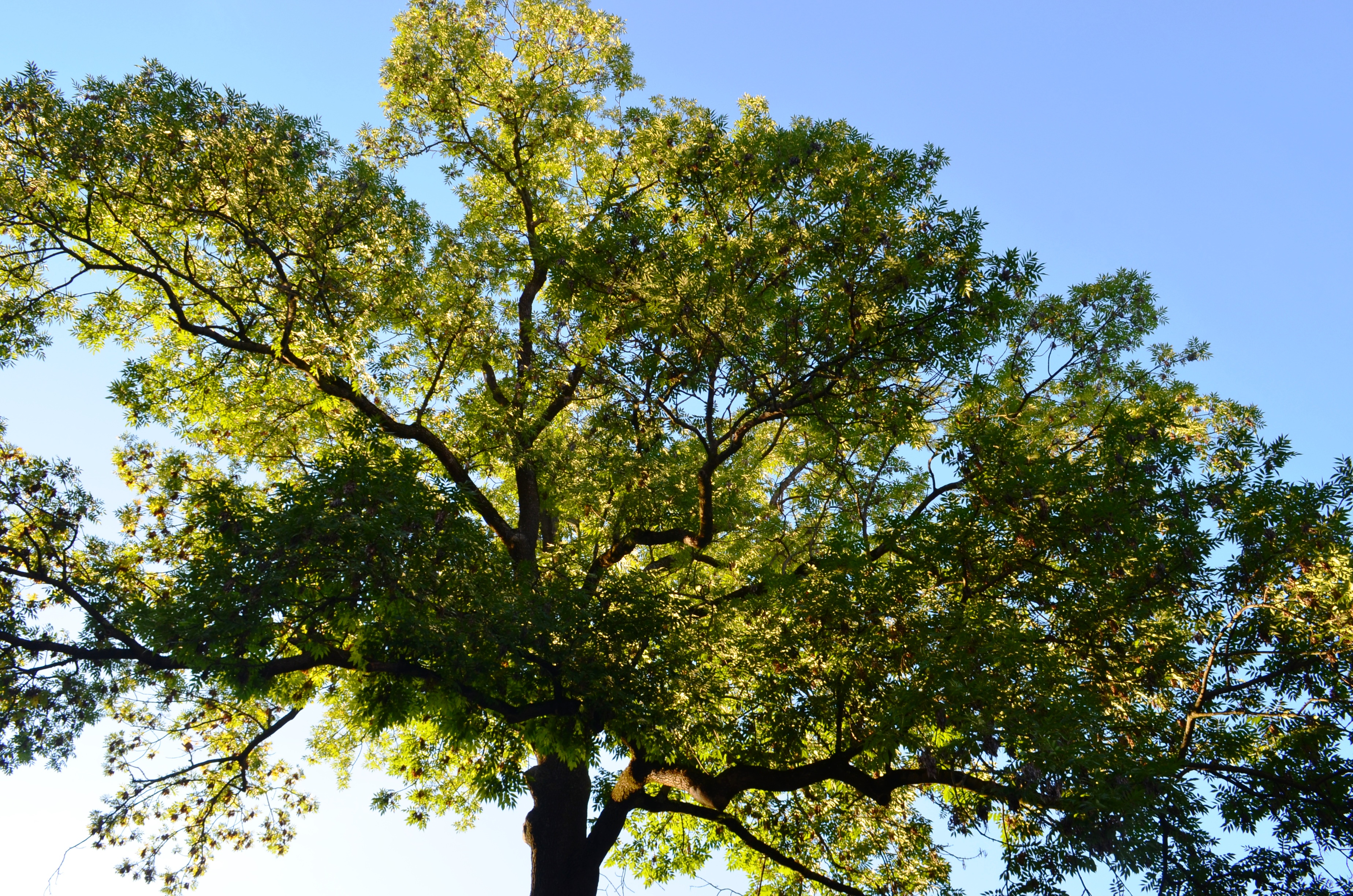 Saugomas uosis, VU A. Mickevičiaus kieme